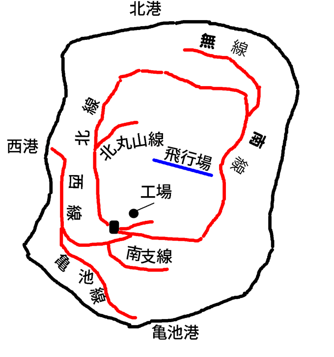 南大東島さとうきび列車